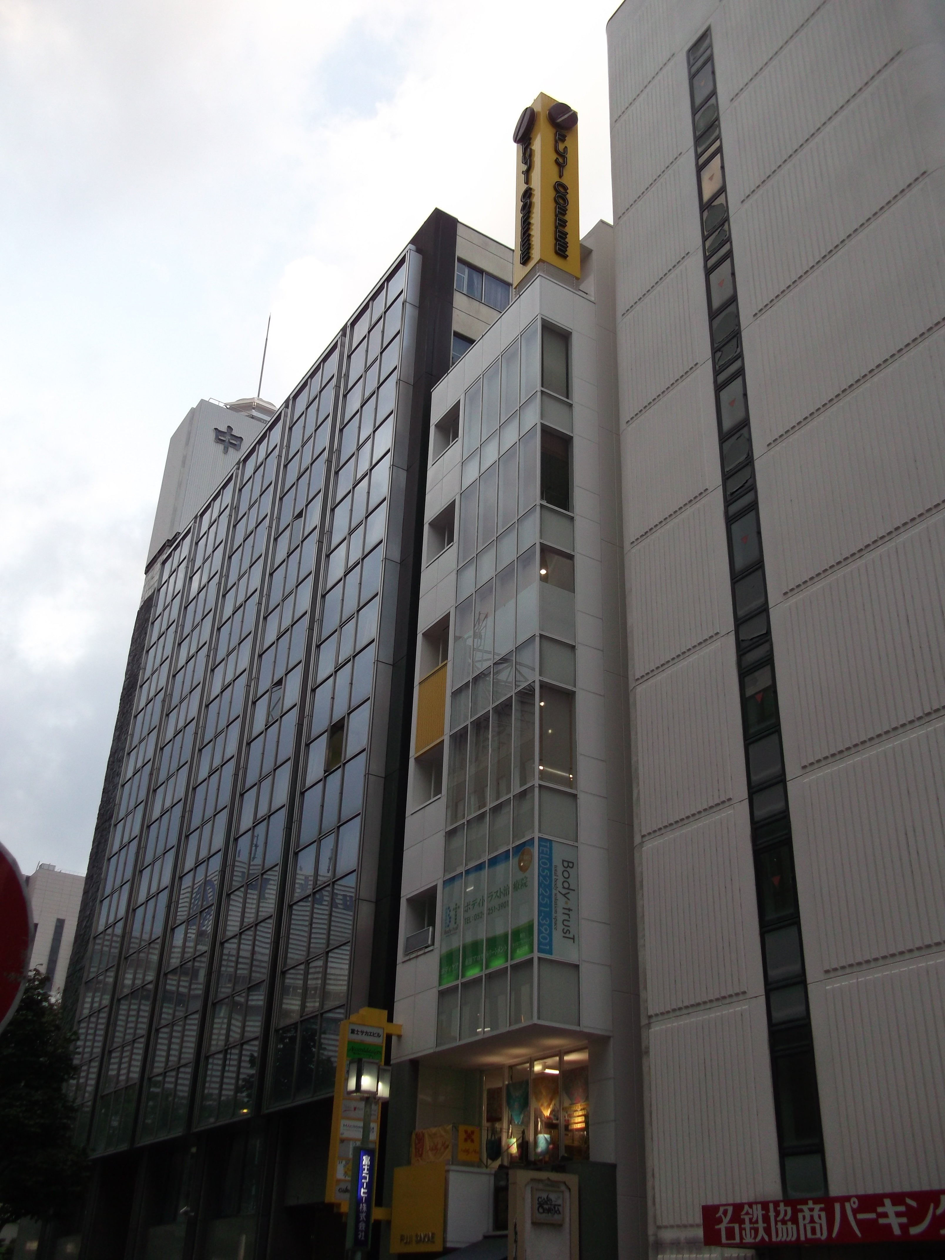 名古屋市中区の富士栄ビルを南側公道東側より撮影